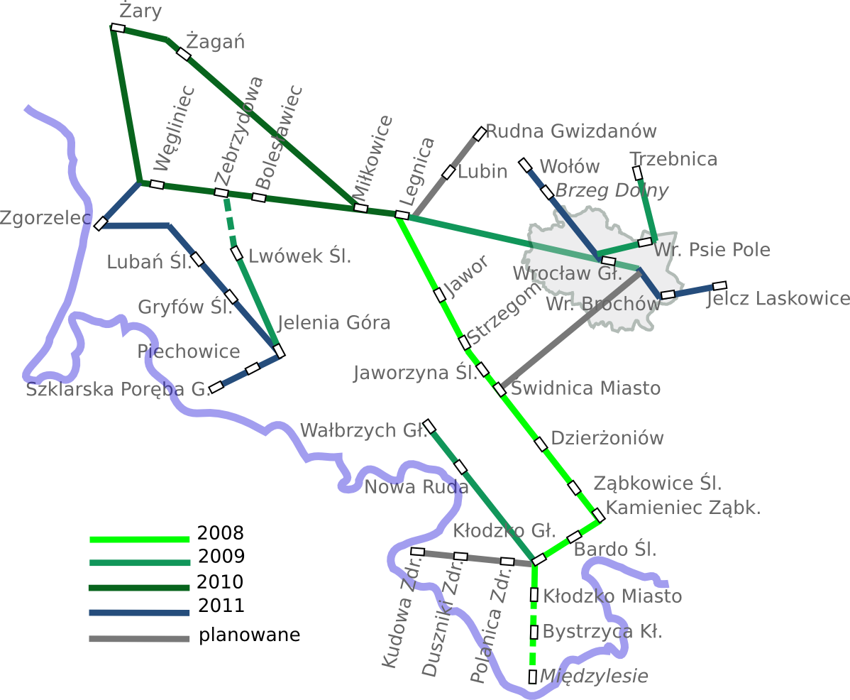 Źrósło